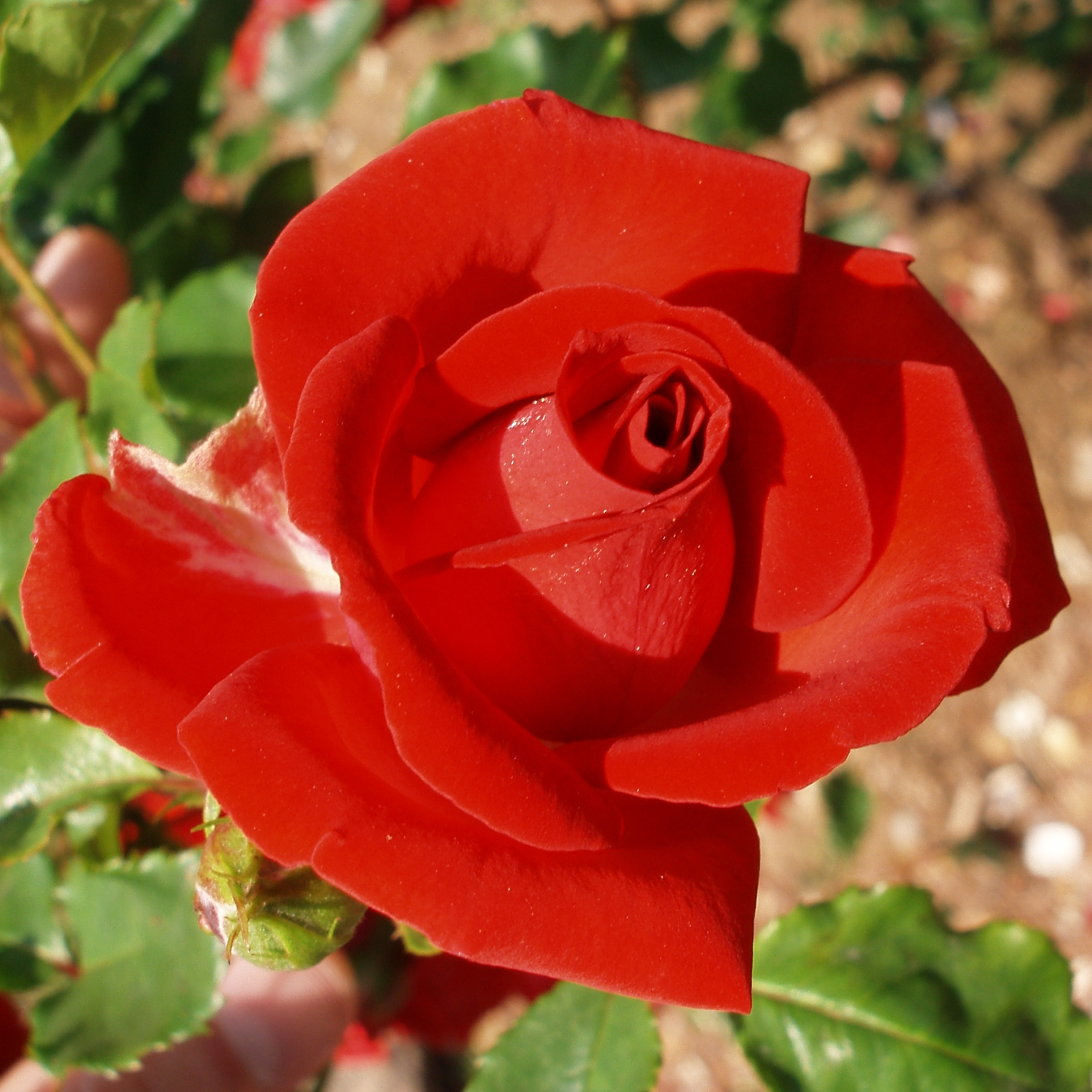 Rosier grimpant 'Intervilles' (A. Eve) roseraie du jardin des Plantes de Paris (Vème)